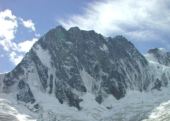 Grandes Jorasses, Massif du Mont Blanc, North side. Photograph by Robin Lacassin, September 2000. Cropped.